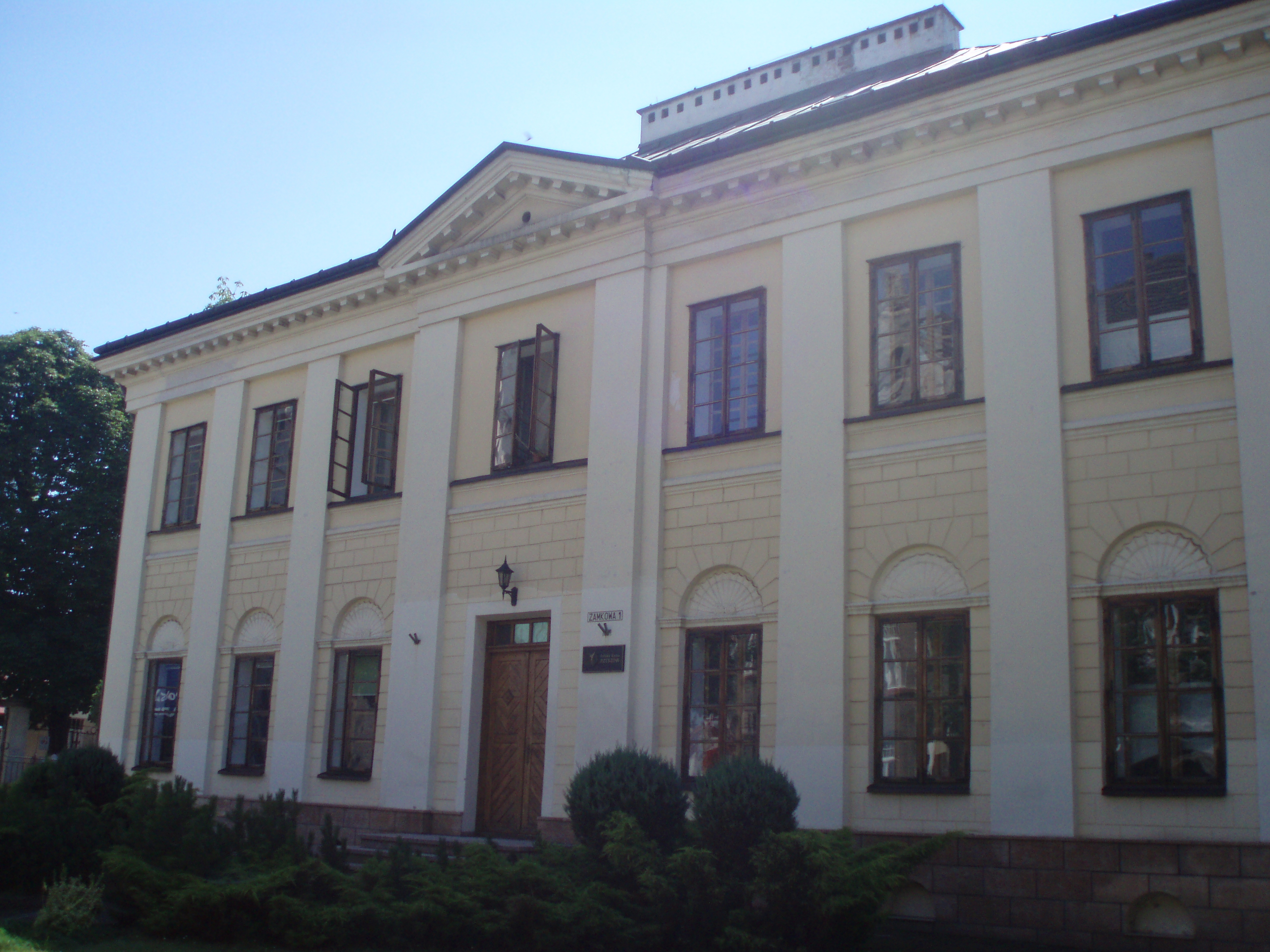 Rzeszów, ul. Zamkowa 1 - Pałac Burgallera, obecnie "Polskie Radio Rzeszów"